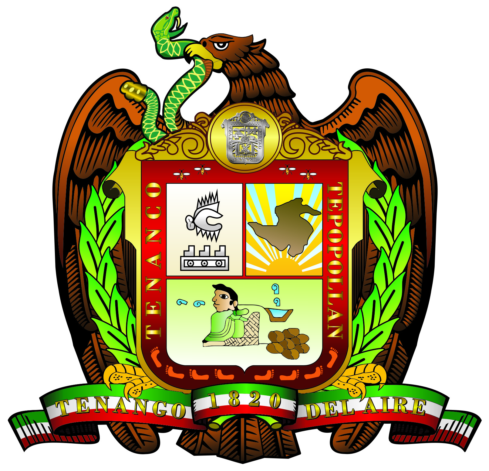 Escudo Heráldico del Municipio de Tenango del Aire a color